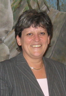 Roswitha Müller-Piepenkötter, Justizministerin des Landes Nordrhein-Westfalen vom 24. Juni 2005 bis zum 14. Juli 2010.